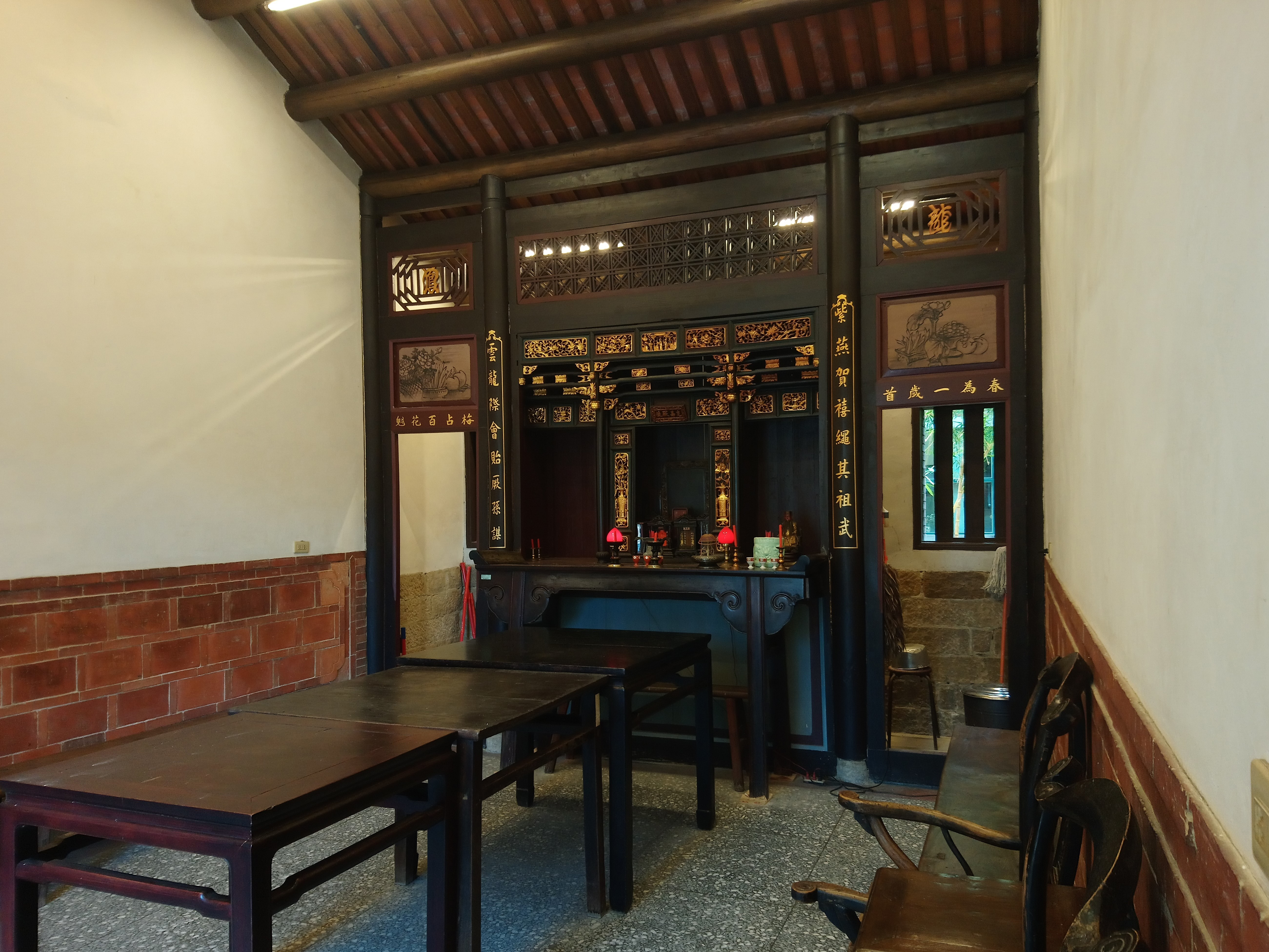 龍安坡黃宅濂讓居公媽廳內部,臺北市大安區學府次分區龍門里